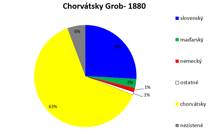 jazykové zloženie